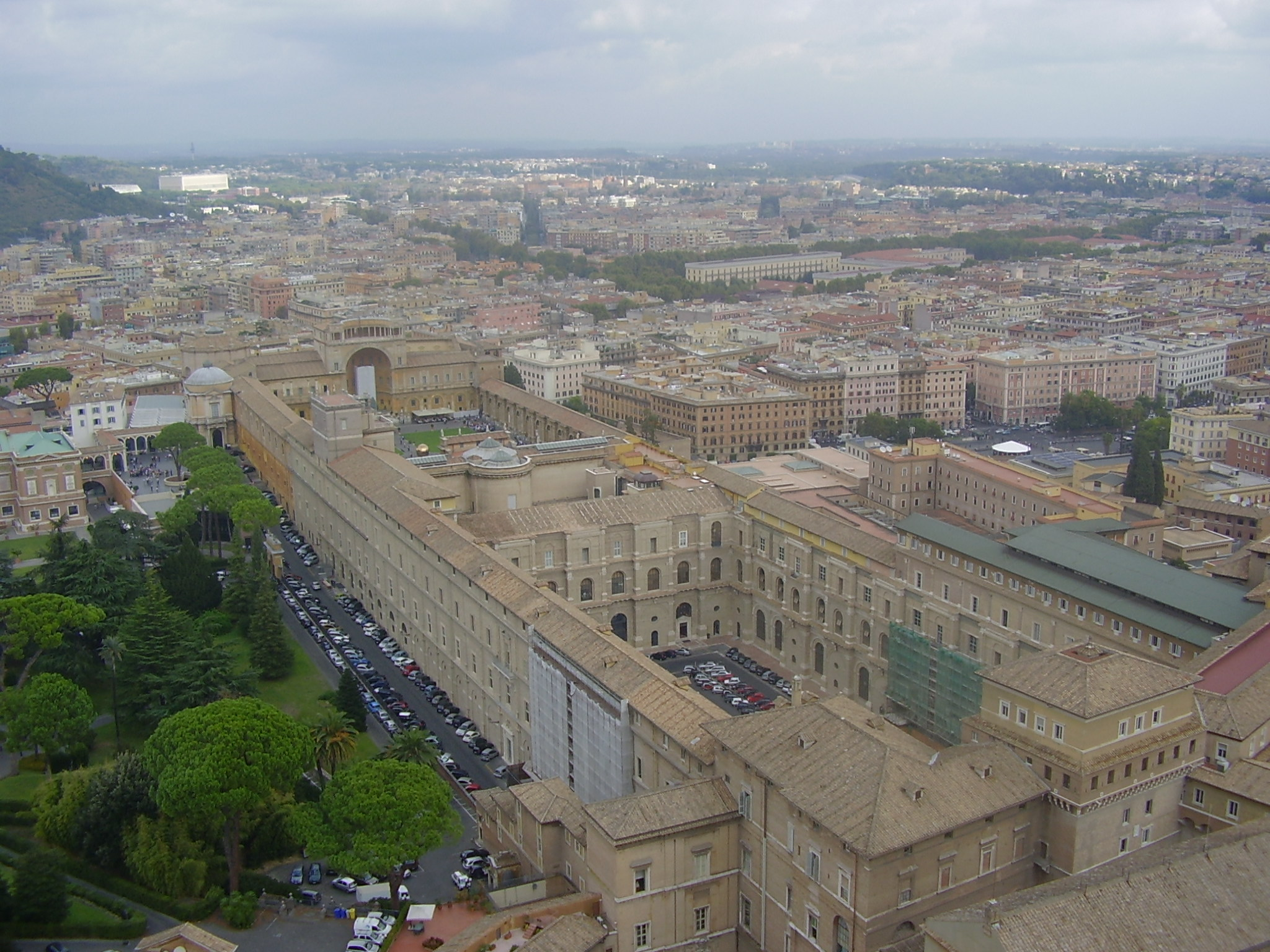 Vatikanische Museen vom Dach des Petersdom aus fotografiert